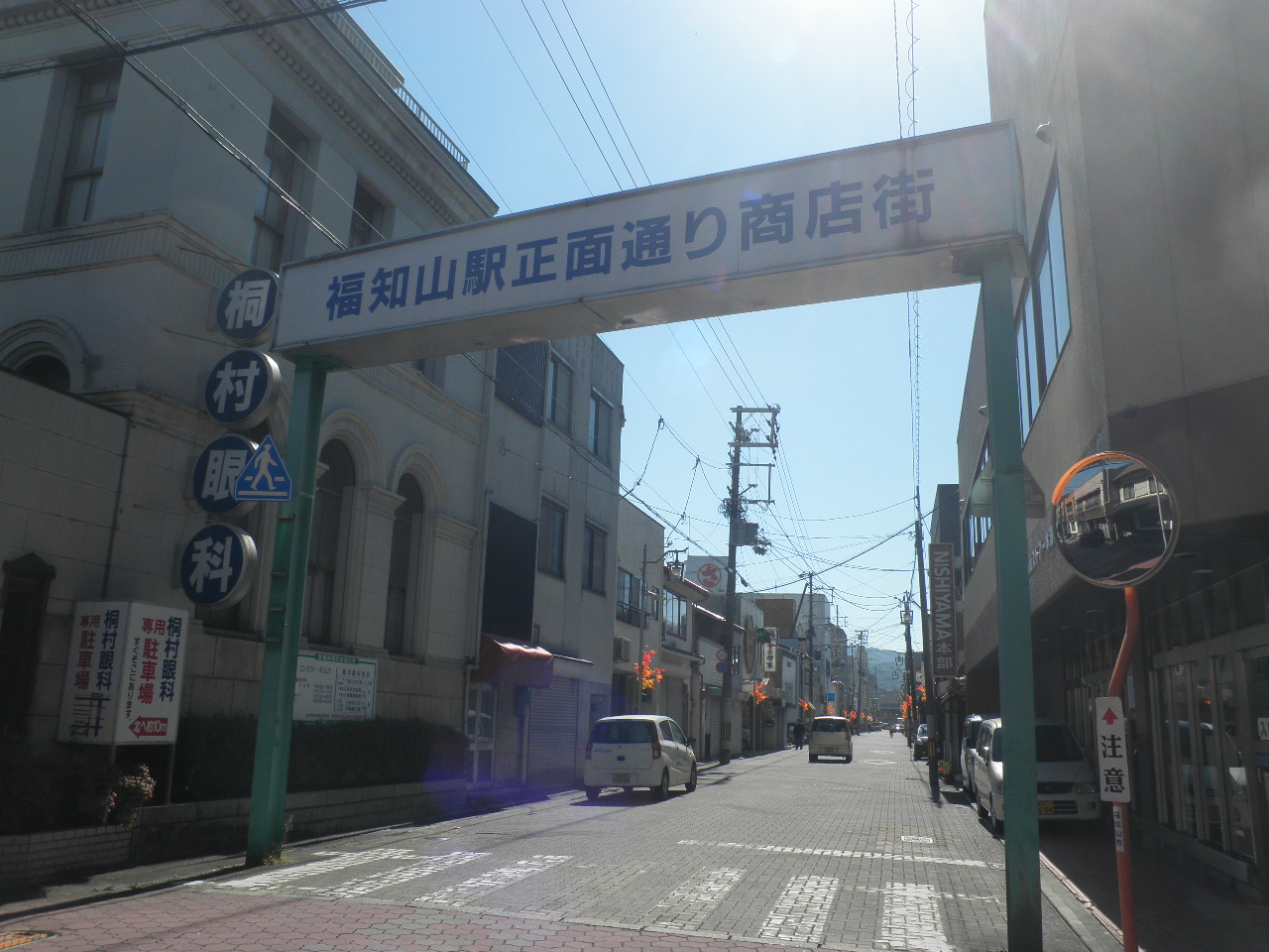 福知山駅正面通り商店街